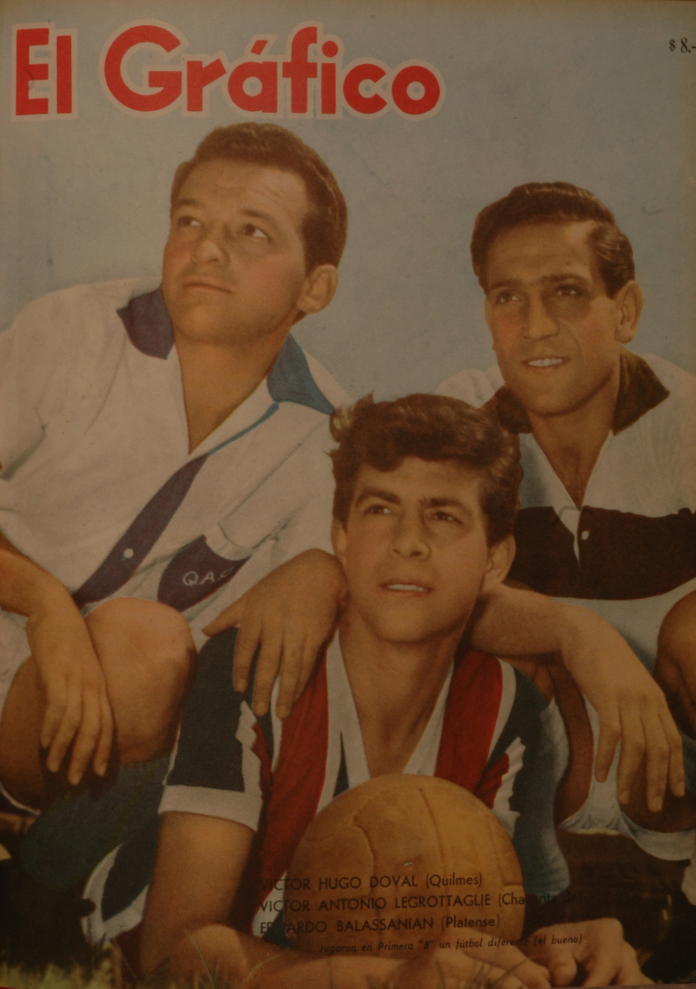 El Grafico del 27 de Enero de 1960. Edicion 2105